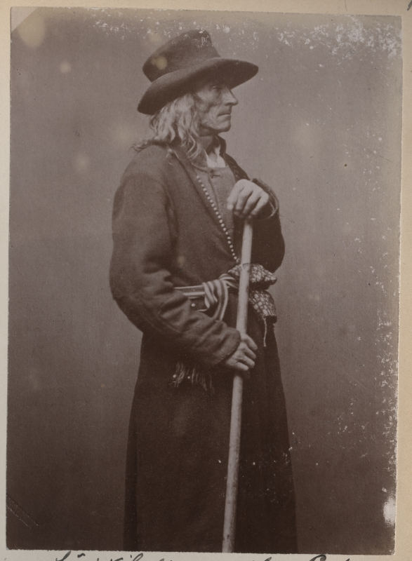 Jüri Numberg, sarjast "Eesti tüübid". Foto on Heinrich Tiidermanni fotoalbumis "Estonica".